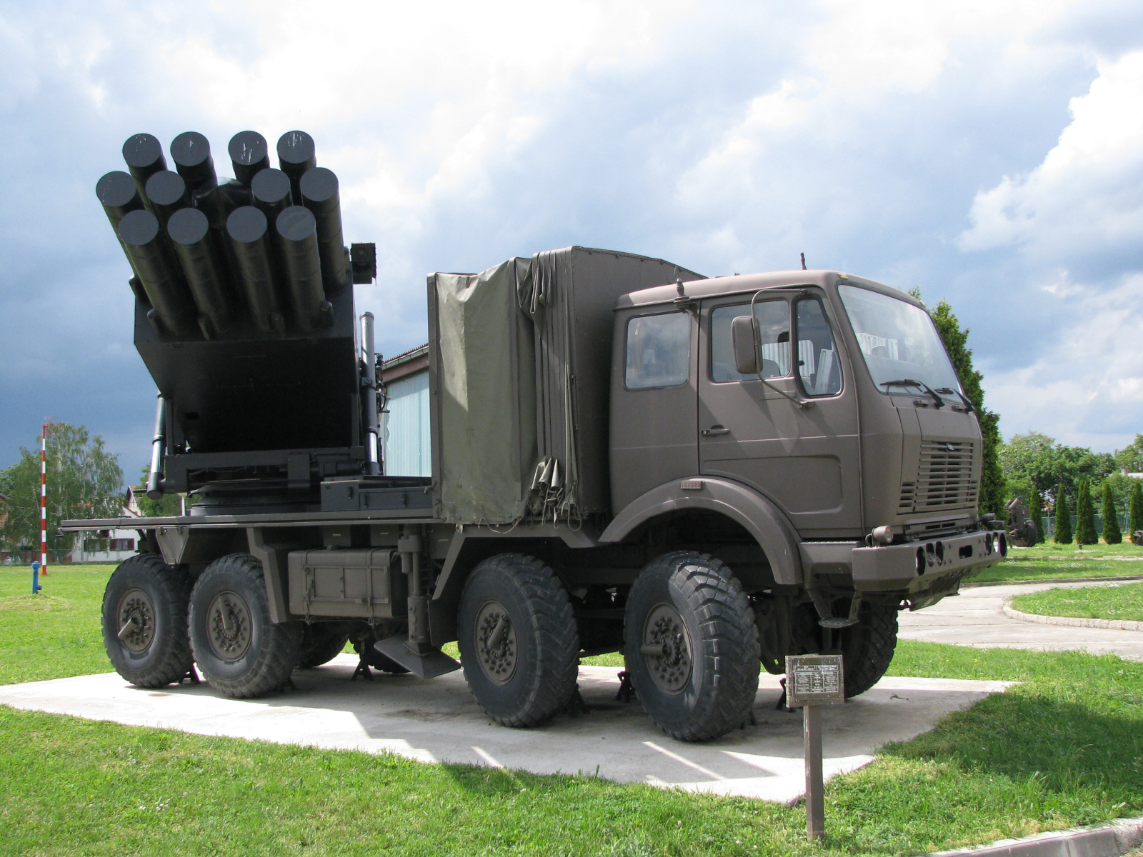 SVLR M-87 Orkan u Vukovaru